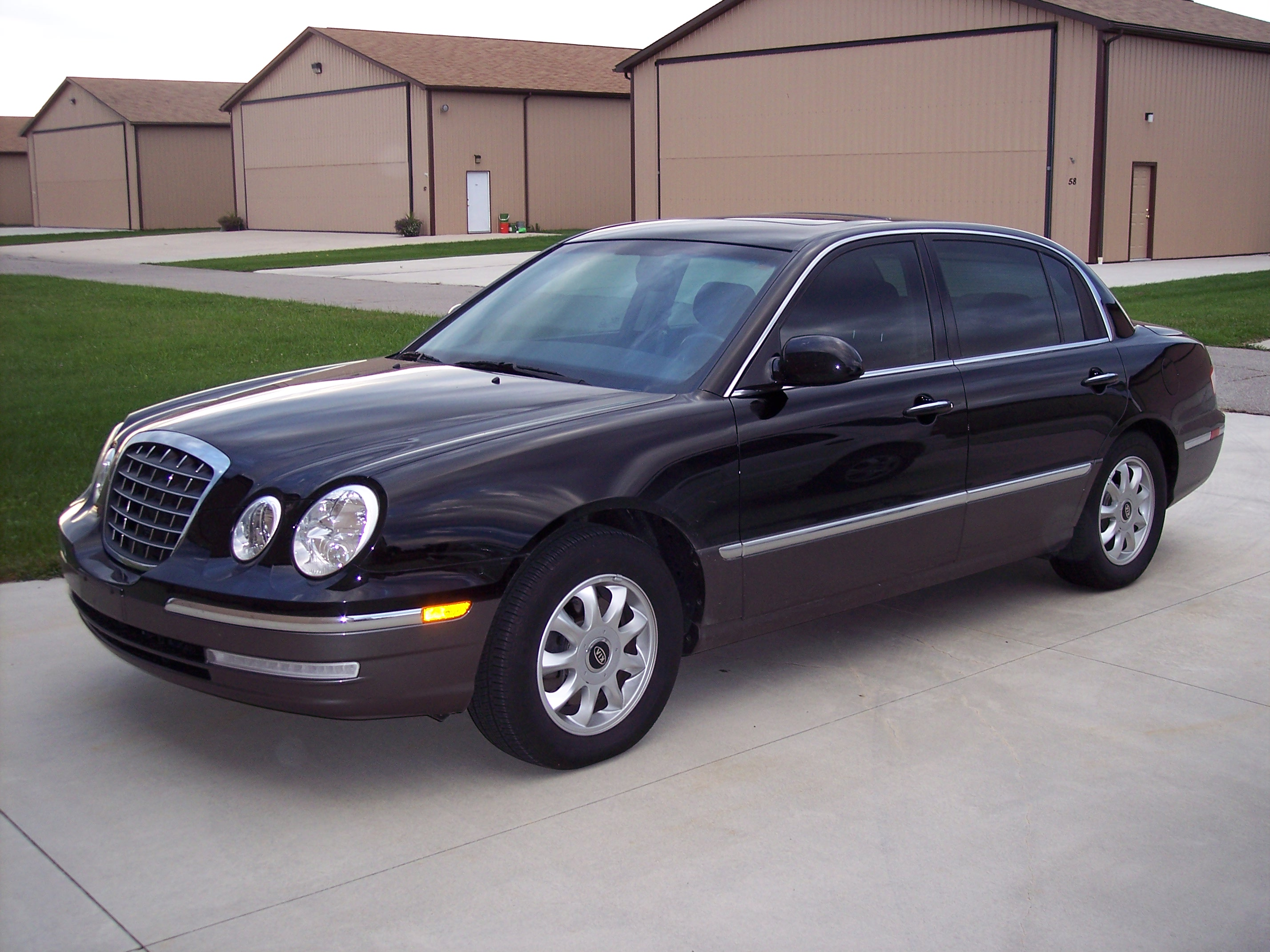 Kia Amanti